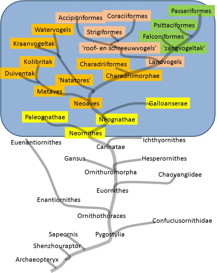 Bijgewerkte versie van de stamboom van Aves